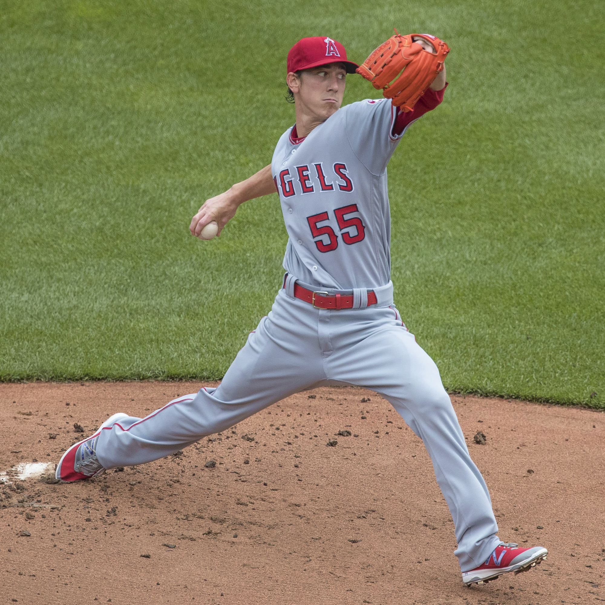 Tim Lincecum